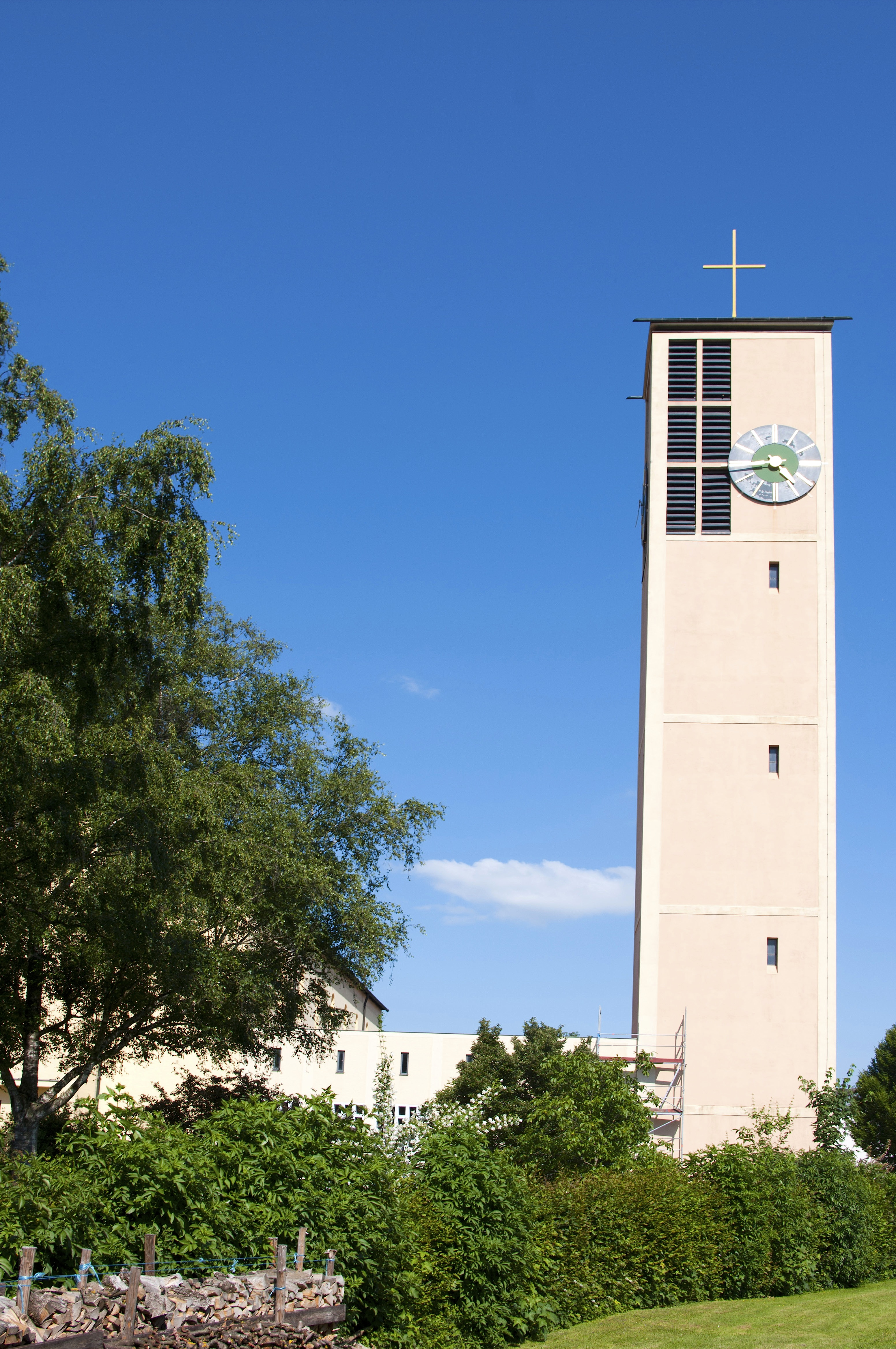 Katholische Pfarrkirche St. Konrad von Parzham, erbaut 1957/60